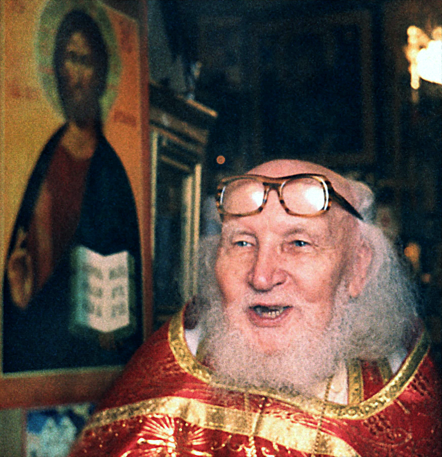 Портрет протоиерея Дмитрия Дудко во время Пасхального богослужения в своем Домовом храме на Речном вокзале, Москва, 2001 г.